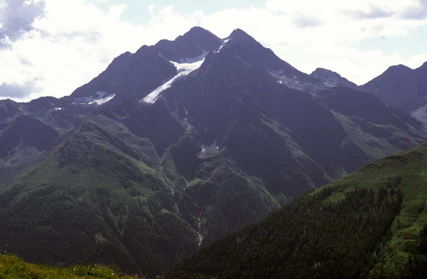 Hoher Riffler von Norden, Verwall, Österreich